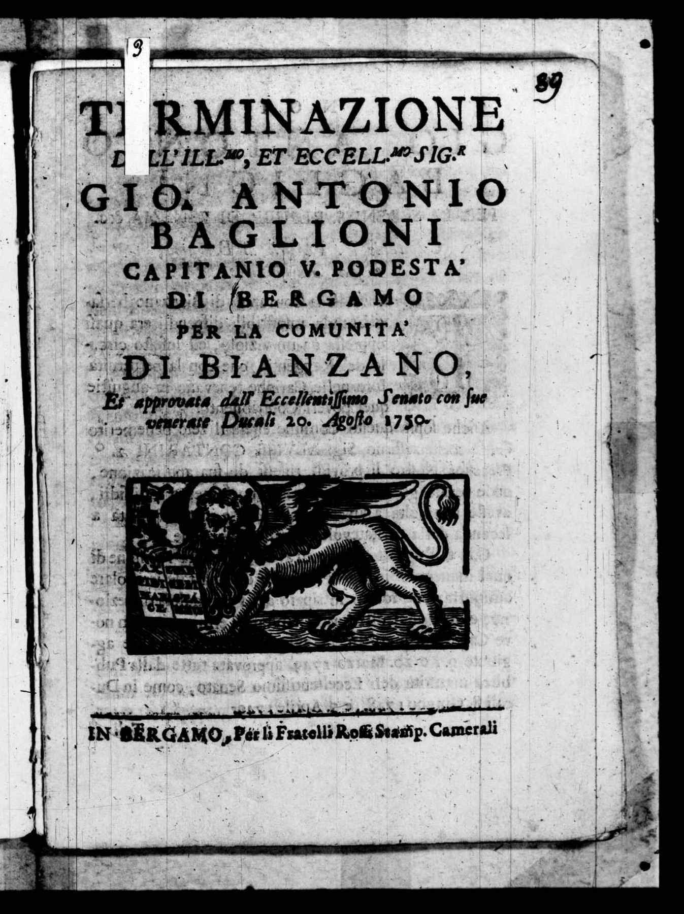 Frontespizio